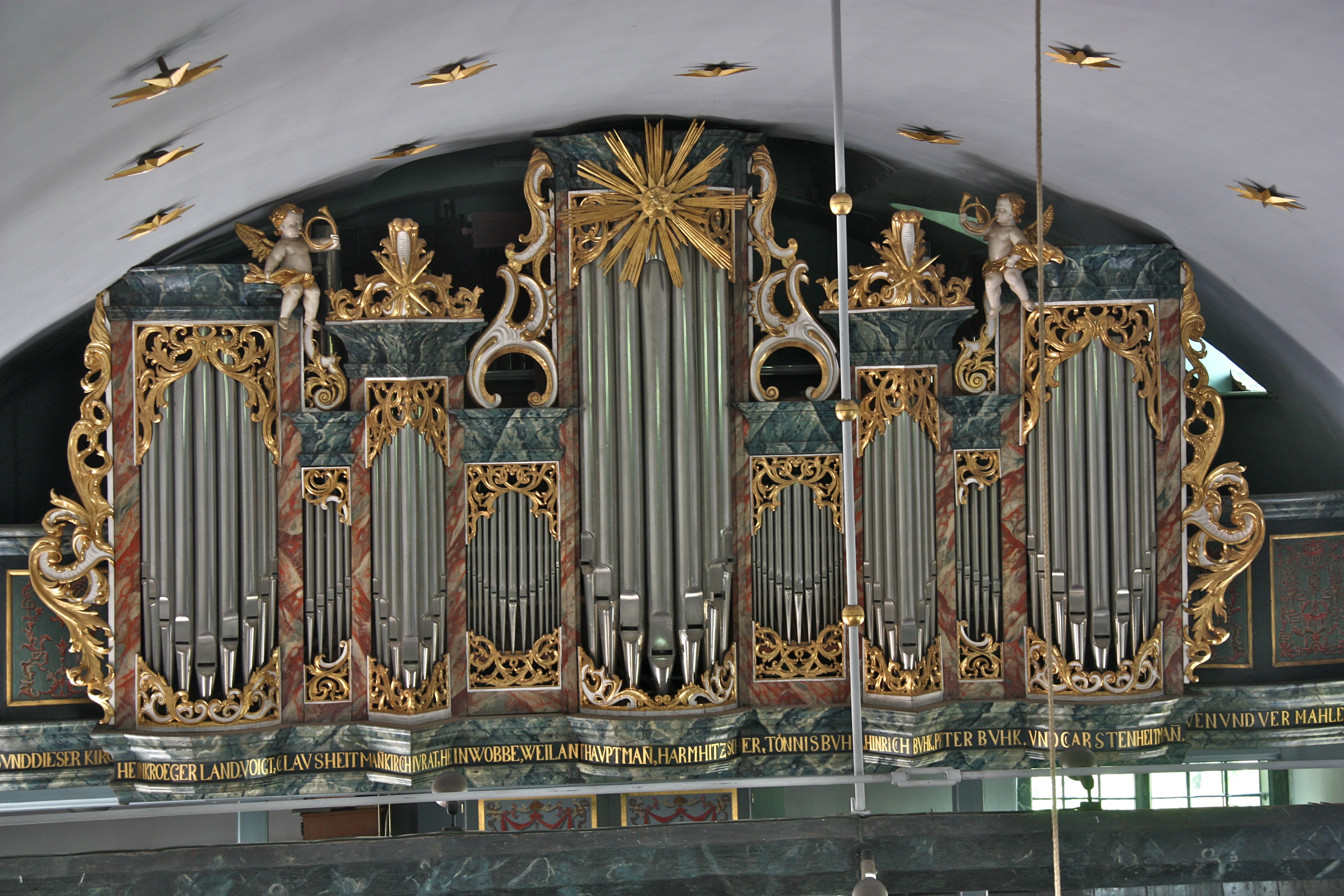 Hamburg, Altengamme, Kirche St. Nicolai, Orgel This is a photograph of an architectural monument.